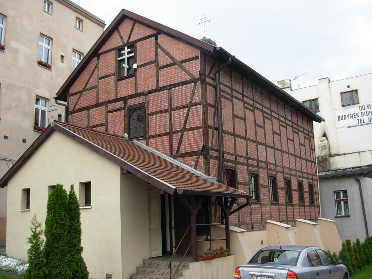 Cerkiew prawosławna w Bydgoszczy